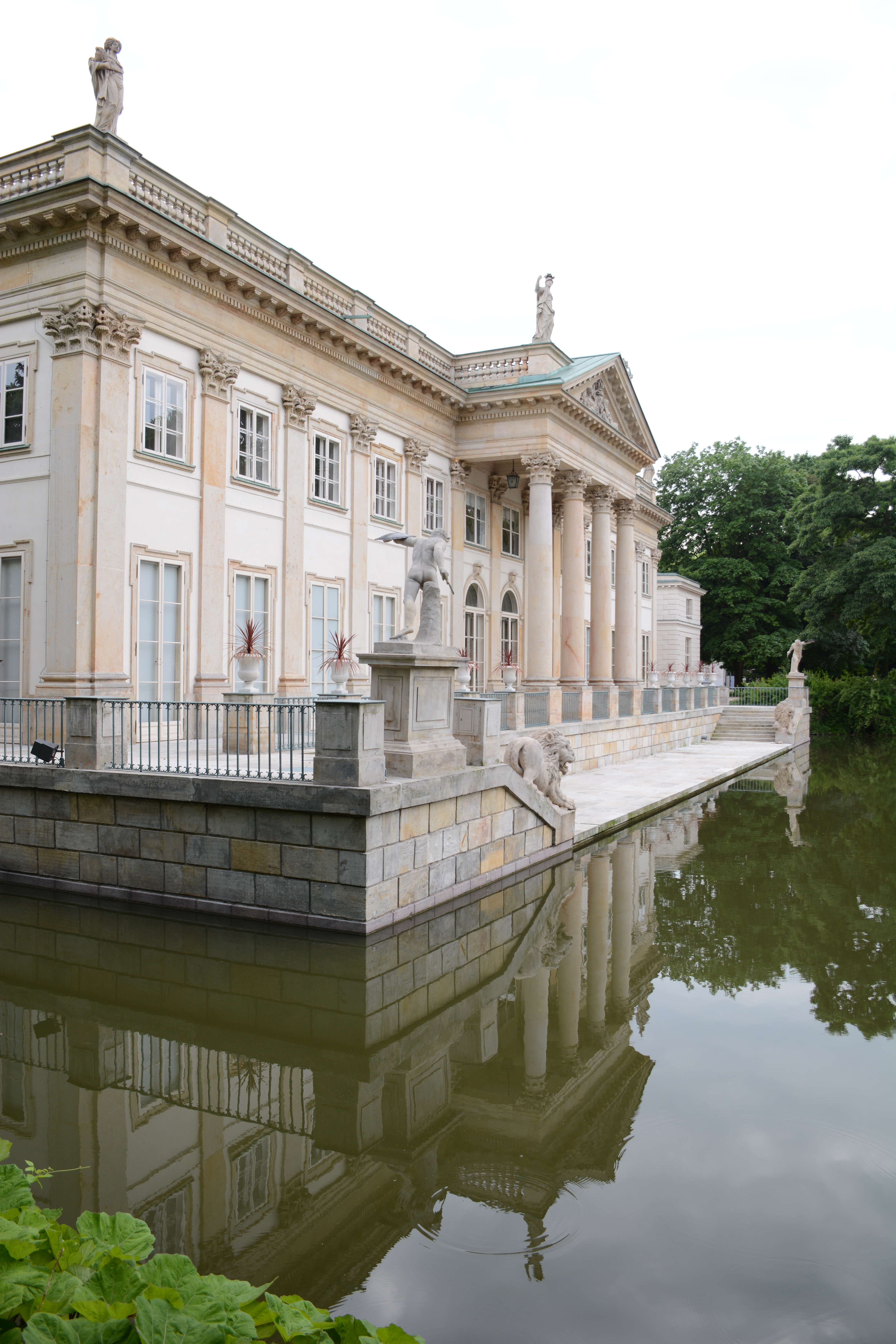 Palac Lazienki,Warszawa,Polska,UE.